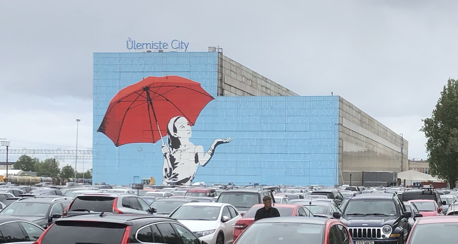 Gewerbegebiet Tallinn